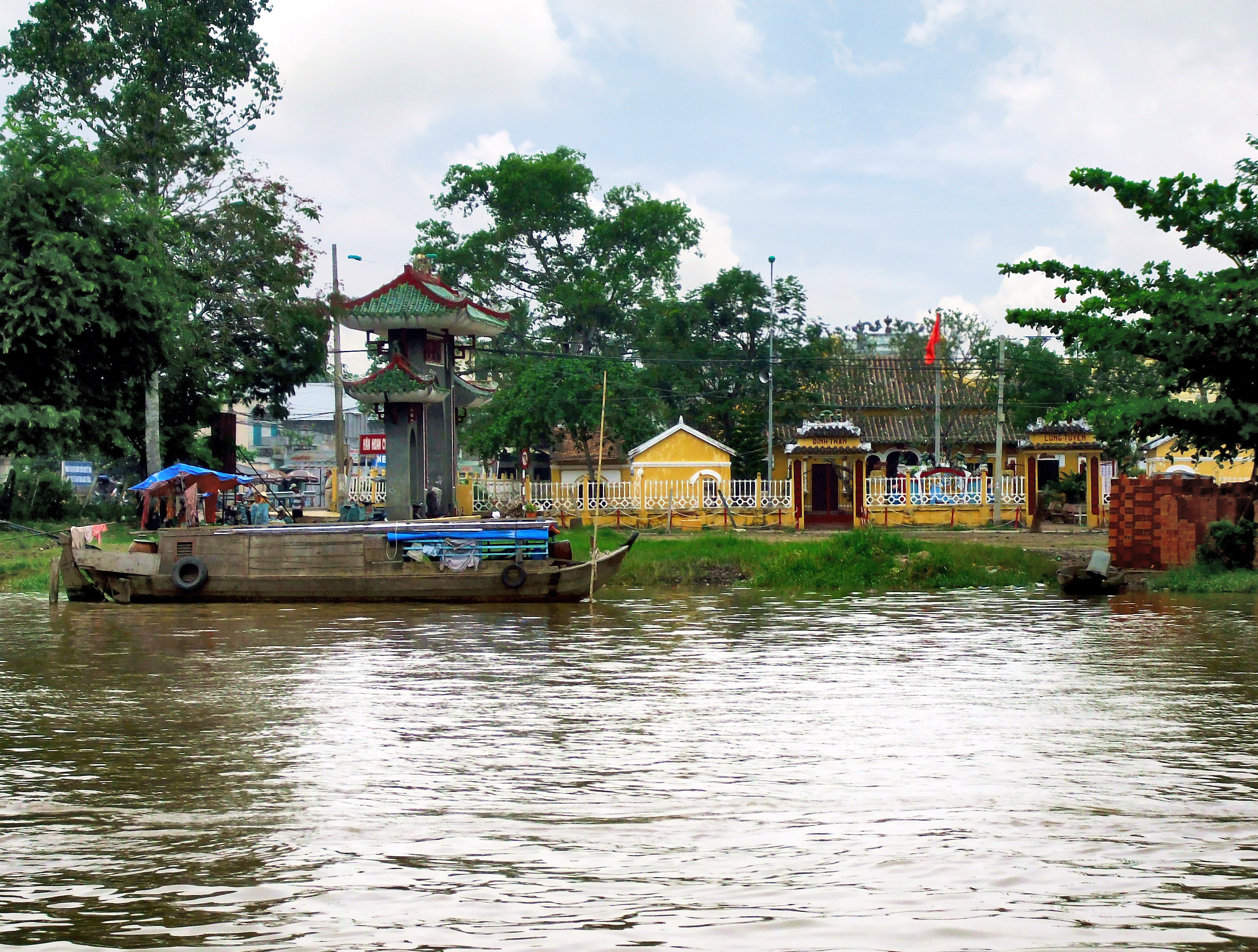 Đình Bình Thủy (tức Long Tuyền Cổ Miếu) ở phường Bình Thủy, quận Bình Thủy, thành phố Cần Thơ, Việt Nam.